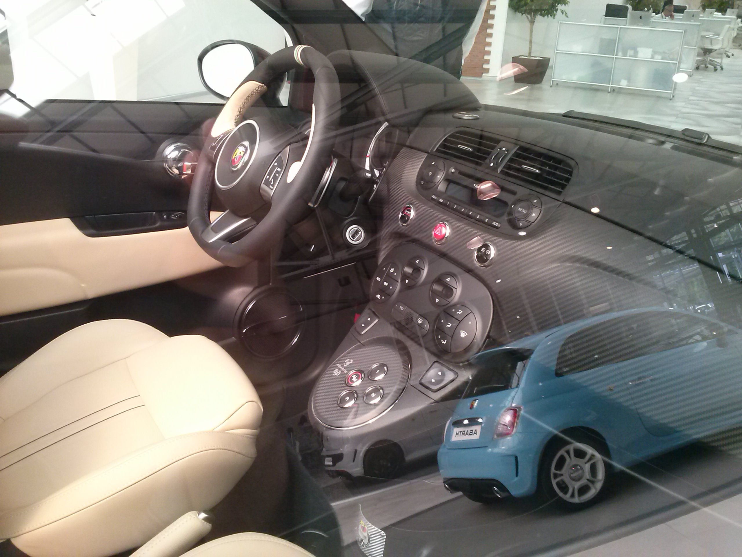 MTA - Manual Trasmission Automatic